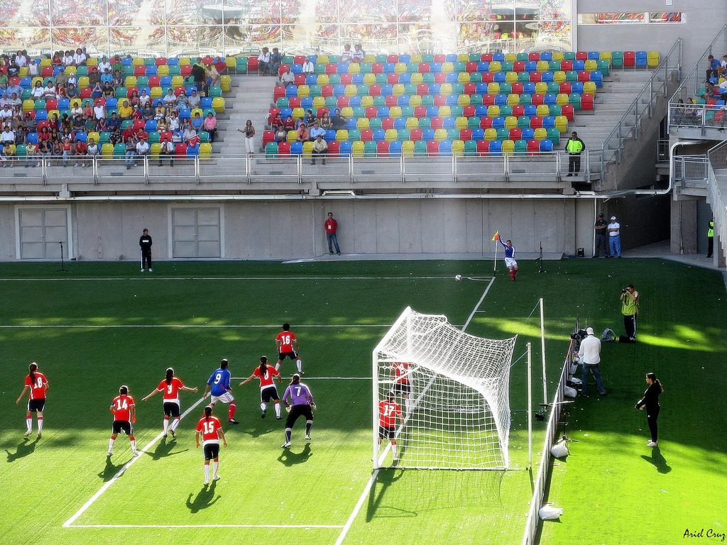 Estadio Bicentenario Municipal de La Florida Comuna de La Florida, Santiago de Chile Las Otras fotos del partido las puedes ver en Facebook